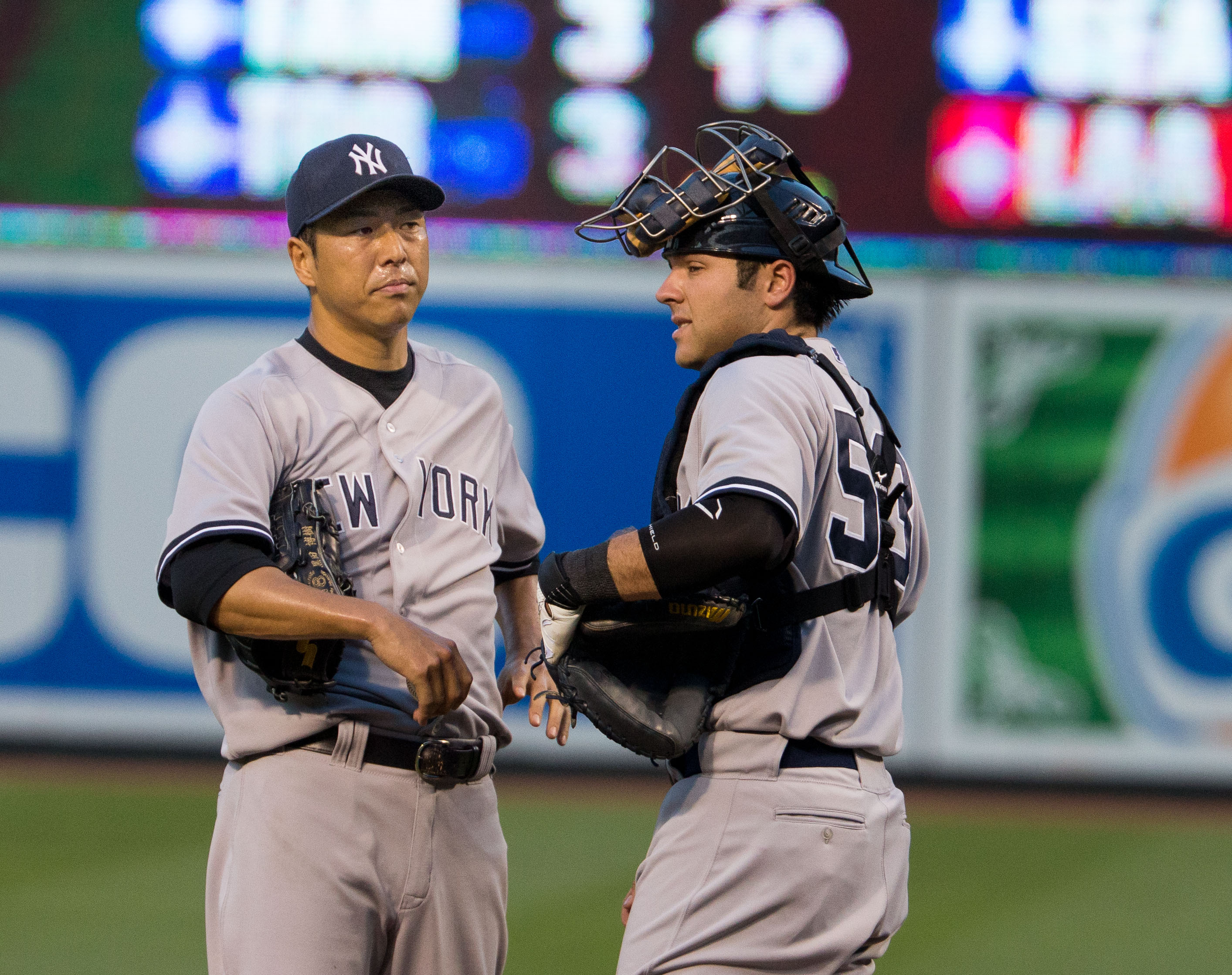 Hiroki Kuroda (left) and Austin Romine